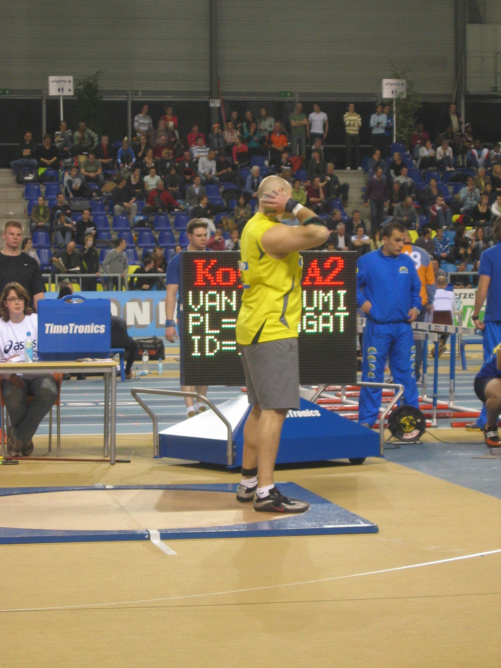 Erik van Vreumingen at Dutch indoor championships '08, Gent